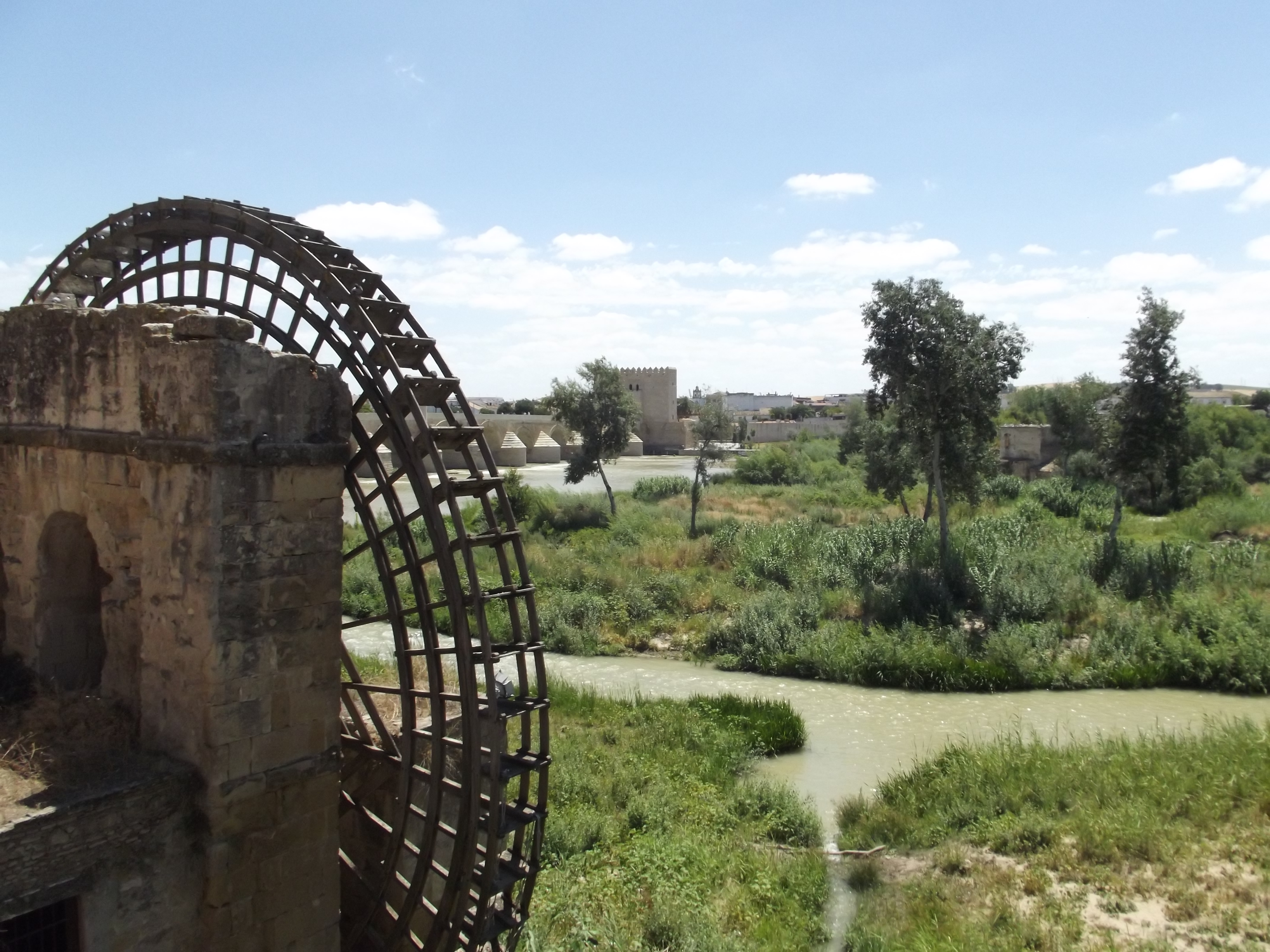 Sotos de la Albolafia y Molino de la Albolafia, Córdoba (España).